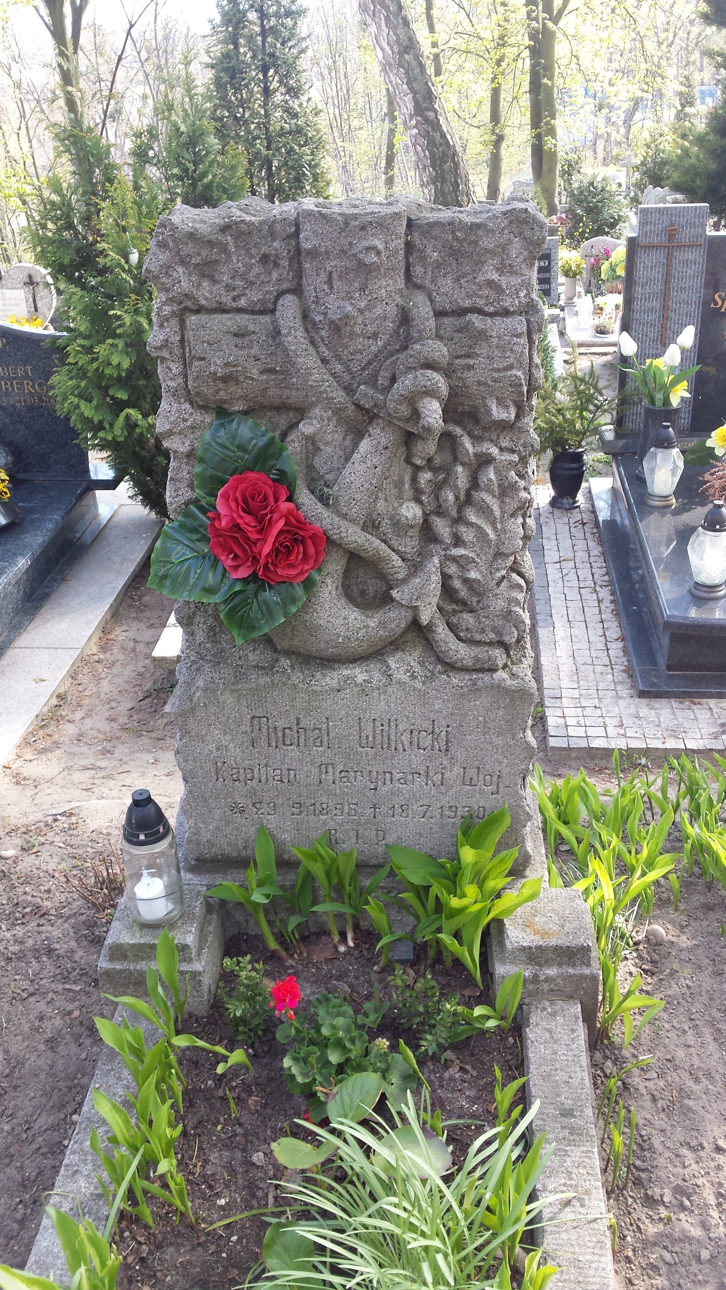 Grób kpt. mar. Michała Wilkickiego na cmentarzu w Gdyni-Oksywiu